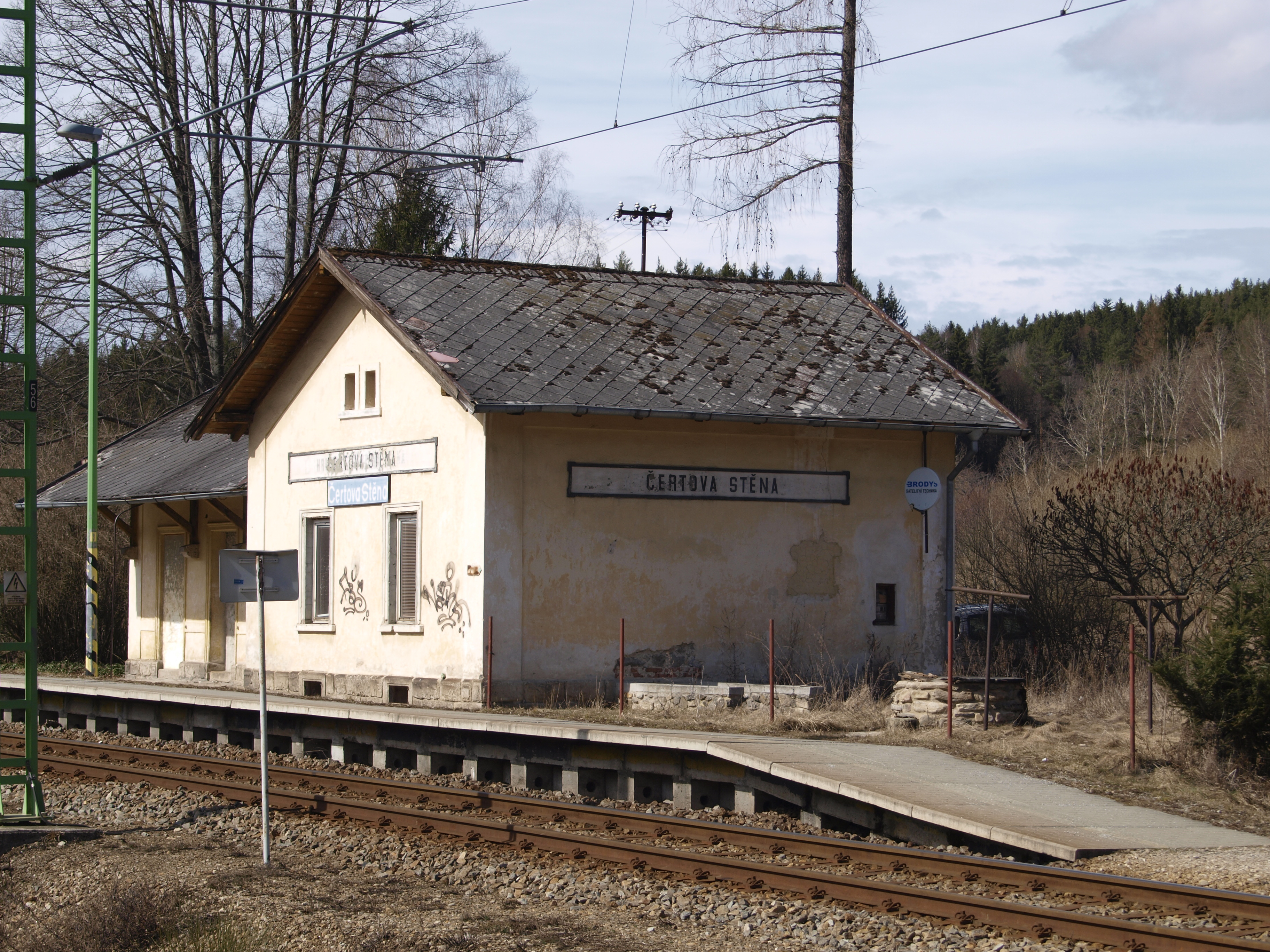 Zastávka Čertova Stěna, trať 195 Rybník - Lipno nad Vltavou Project: Fotíme Česko.